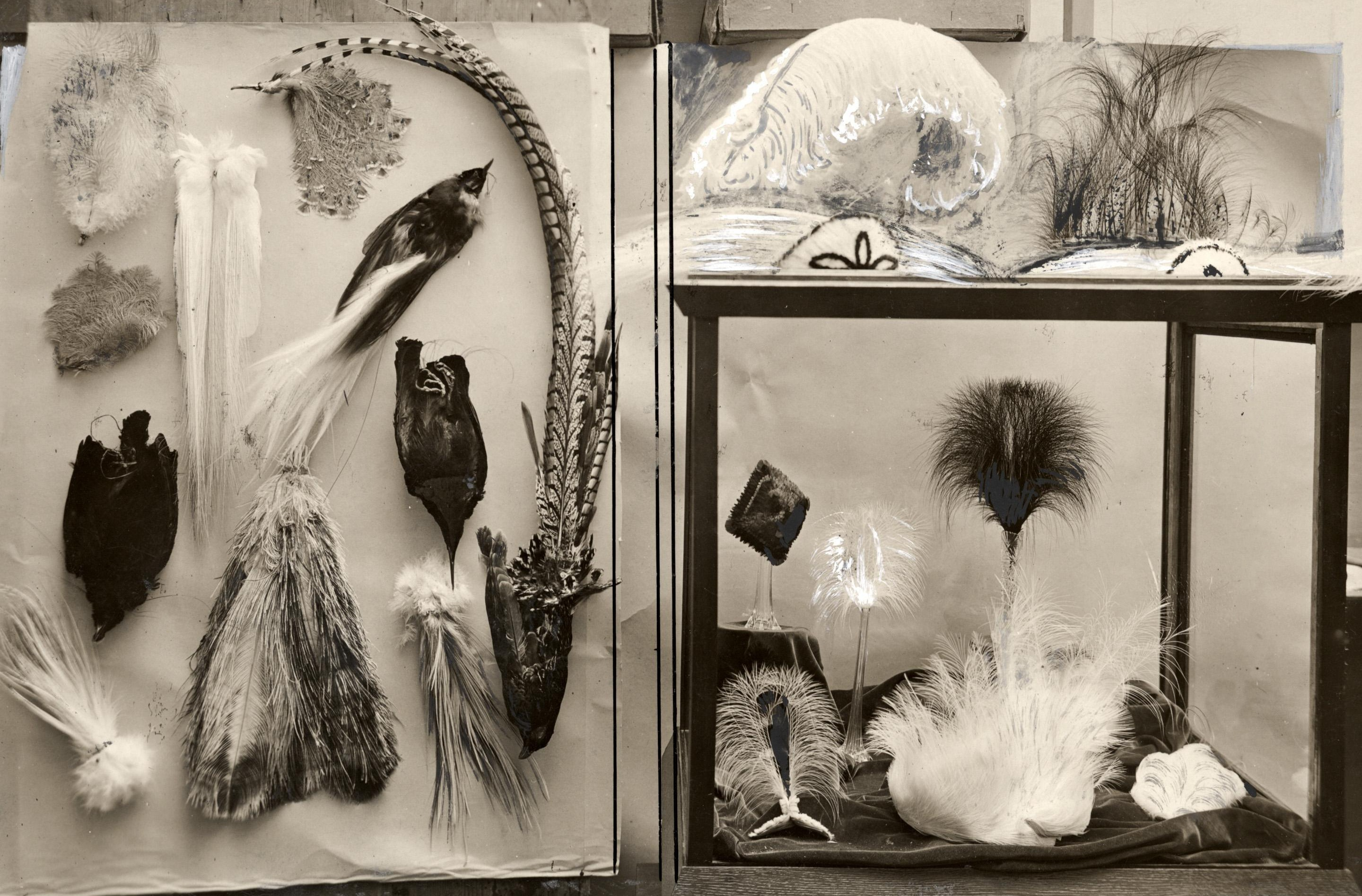 Dieren, damesmode. Veren van struisvogels verwerkt in allerlei modieuze accessoires. Amsterdam, Nederland, 1919